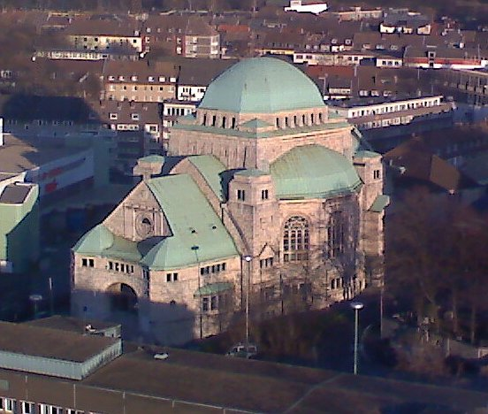 Alte Synagoge Essen